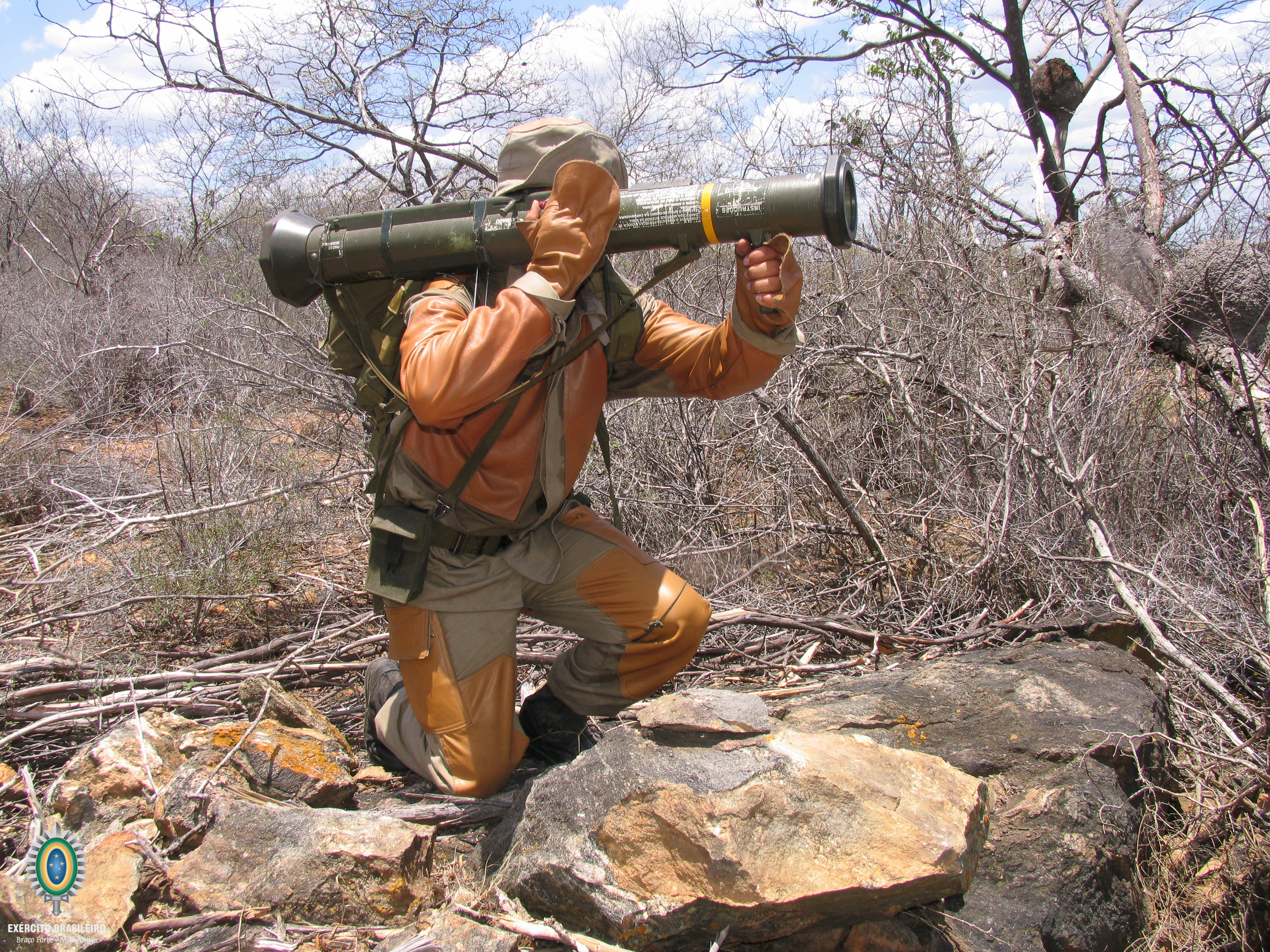 Foto: Ivan Cruz